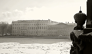 Санкт-Петербургский государственный университет культуры и искусств (СПбГУКИ). Зимняя фотография. Здание построено в 1784-1788 году, архитектор - Джакомо Кваренги